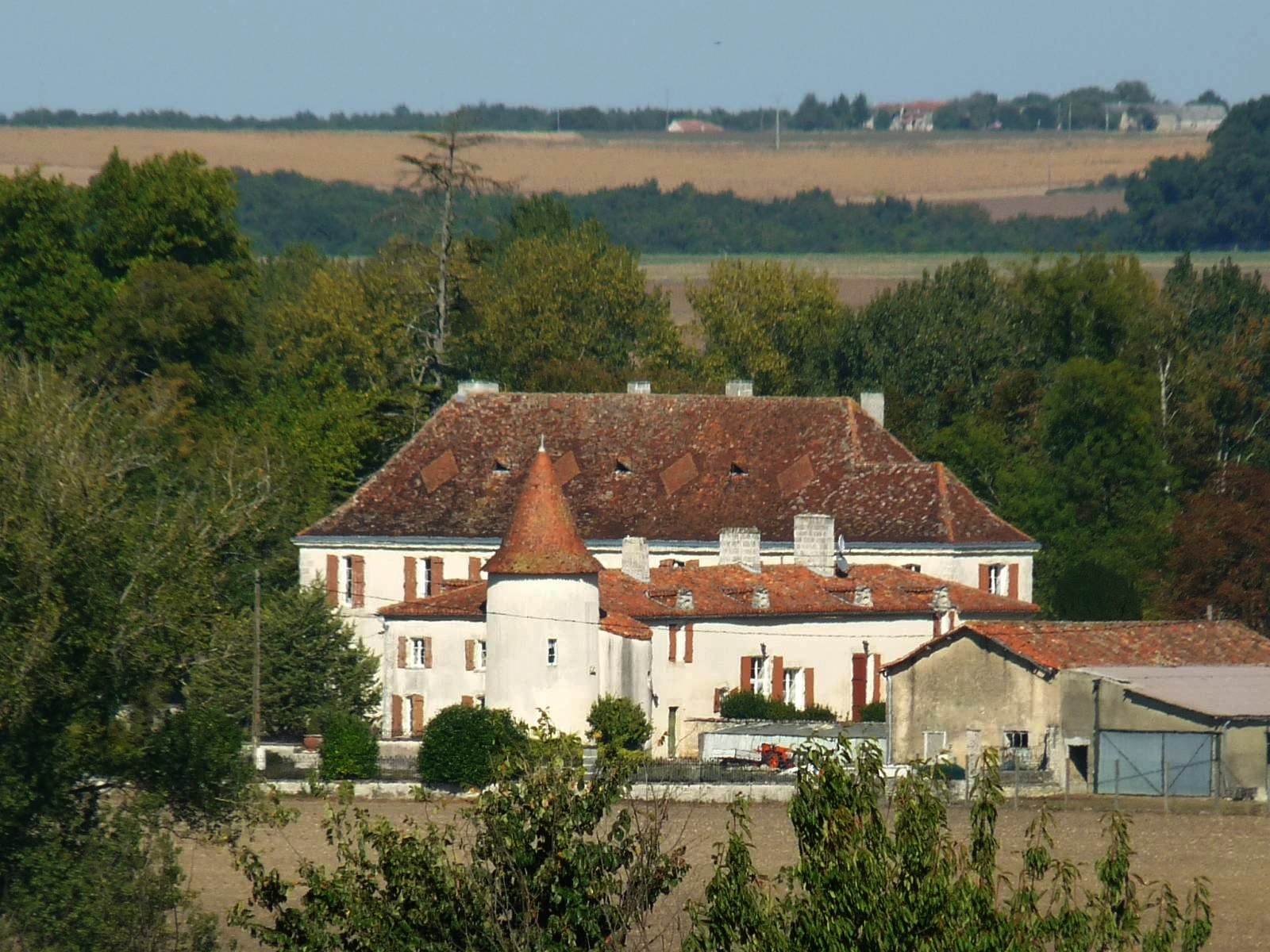 château du Bourbet, Cherval (24), France